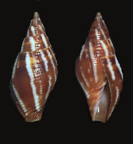 Mitra (Strigatella) pica Dillwyn, 1817 ; Mindanao, Philippines